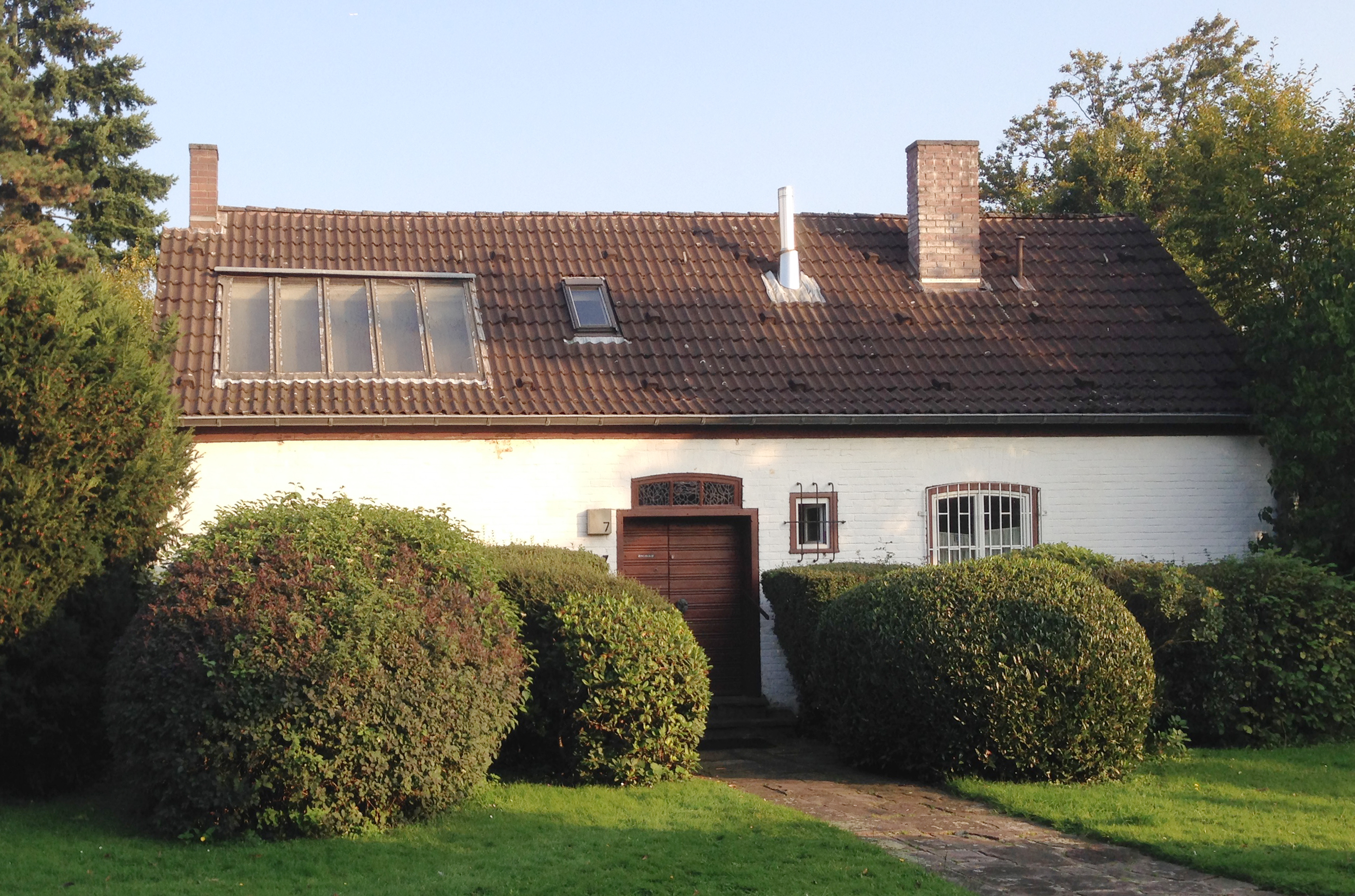 Haus Franz-Jürgens-Straße 7, von 1936 bis 1961 Wohn- und Atelierhaus des Bildhauers Kurt Zimmermann in Düsseldorf-Golzheim